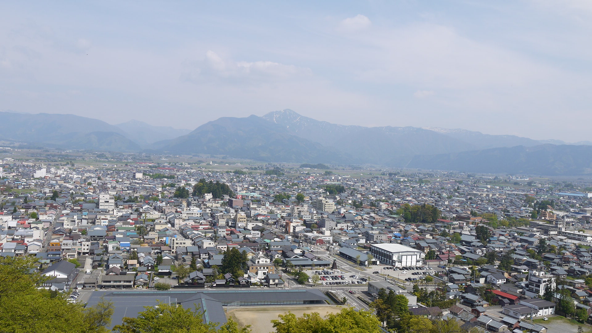 越前大野城 天守閣から1